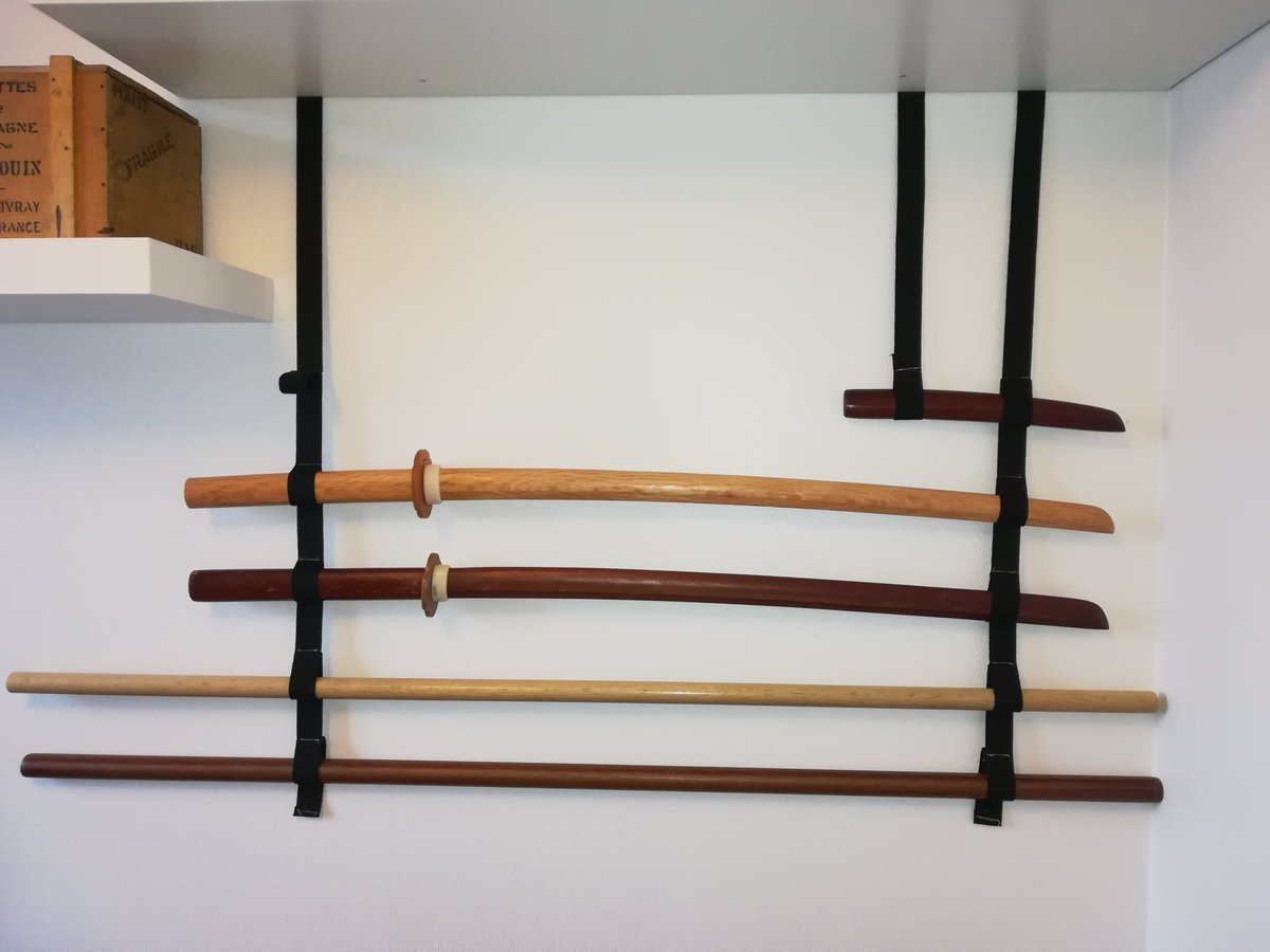 Ce katana-kake en tissu (sangle coton noire avec des boucles de 12cm de circonférence tous les 10cm) présente, du haut vers le bas, les armes d'entraînement d'aïkido suivantes : - 1 tantō, - 2 bokken - 2 jō